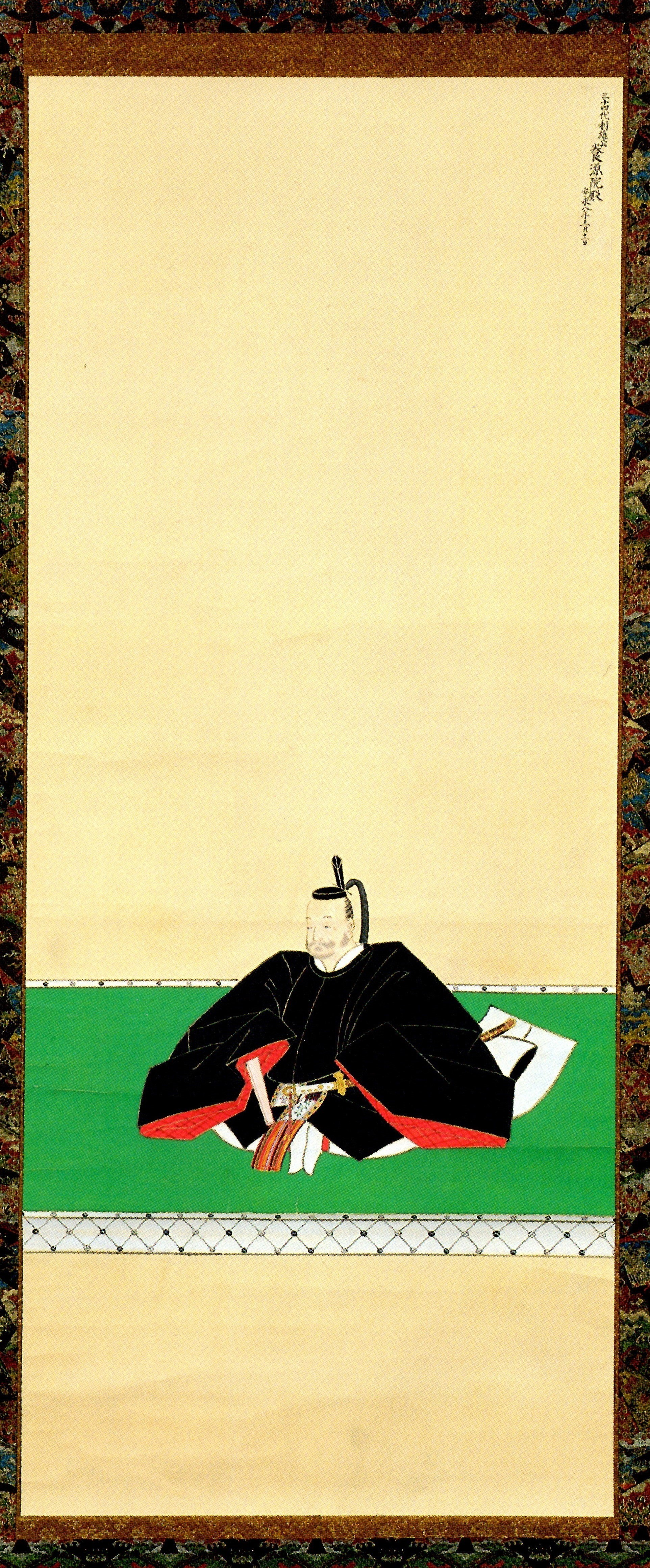 南部利雄の肖像。